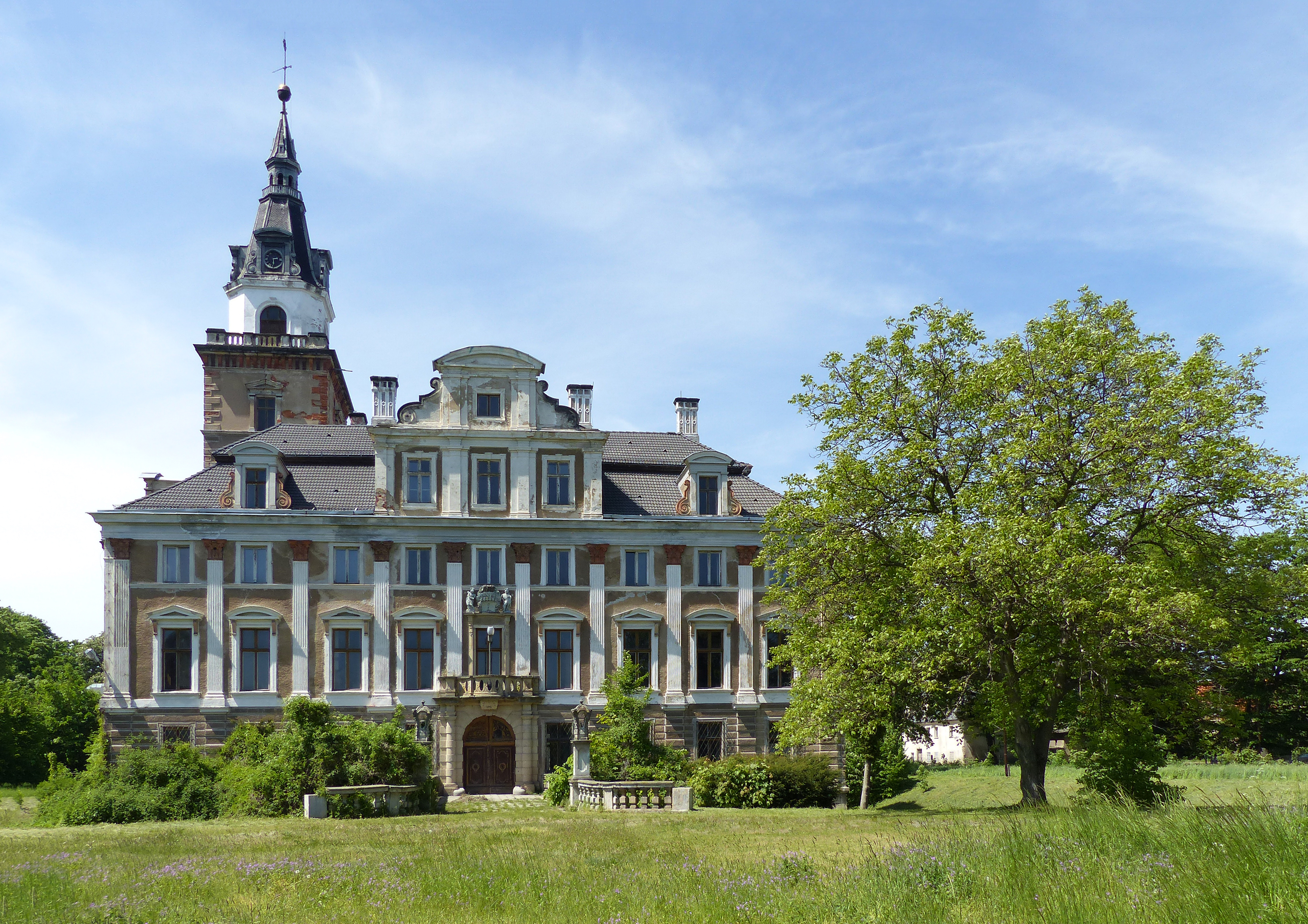 Roztoka, pałac, 1 poł. XVIII, XIX